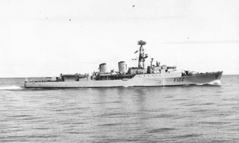 HMS Gurkha (F122)